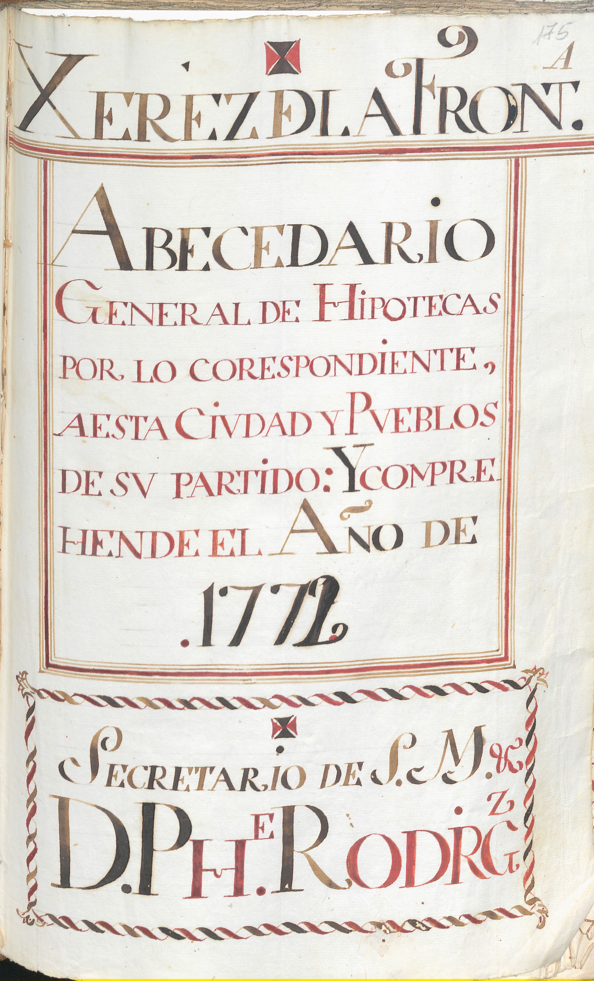 Libro índice del registro de toma de razón de hipotecas de Jerez. Año 1772.